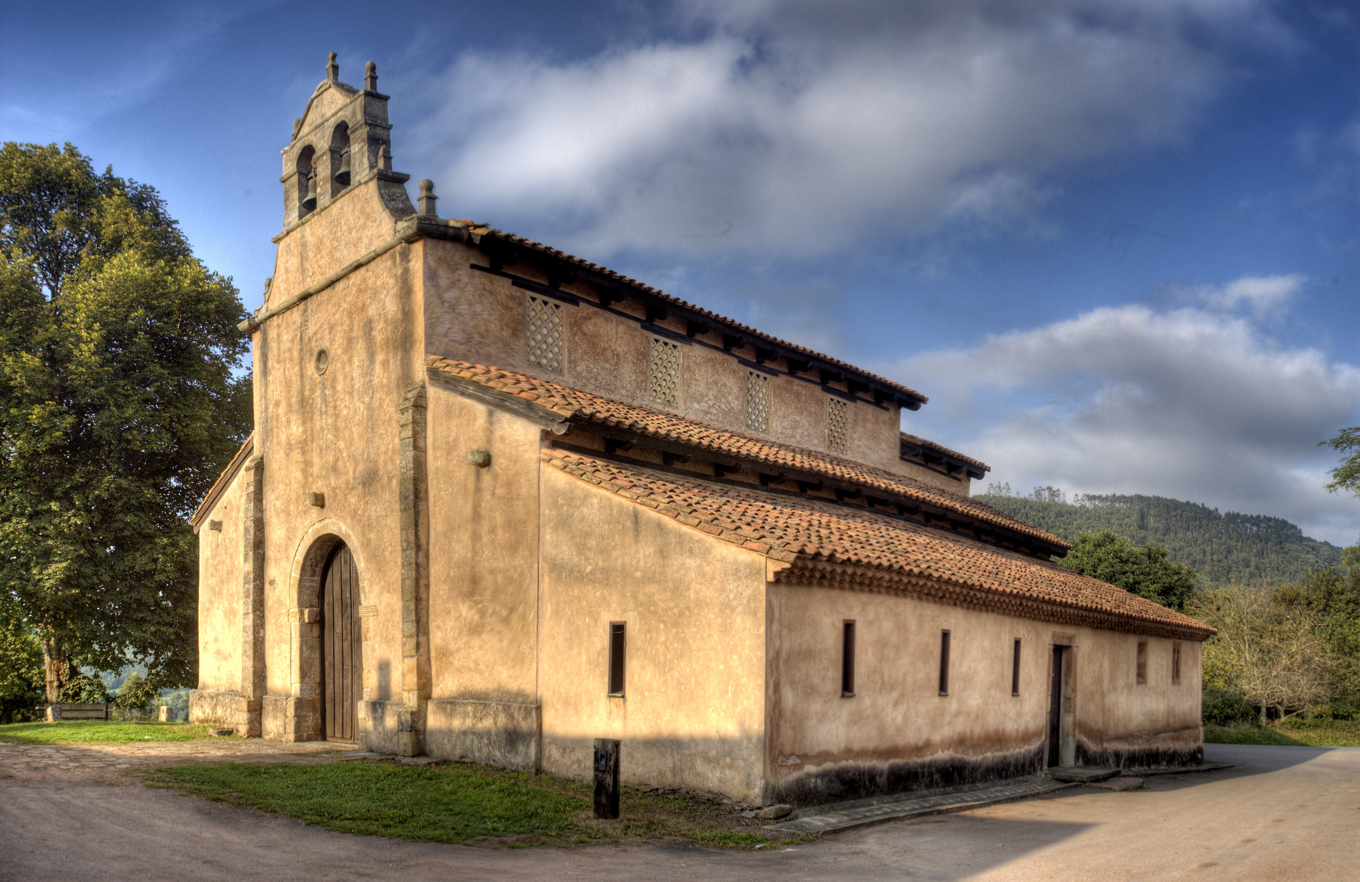 Iglesia de estilo rural y origen prerrománico consagrada en el año 921.